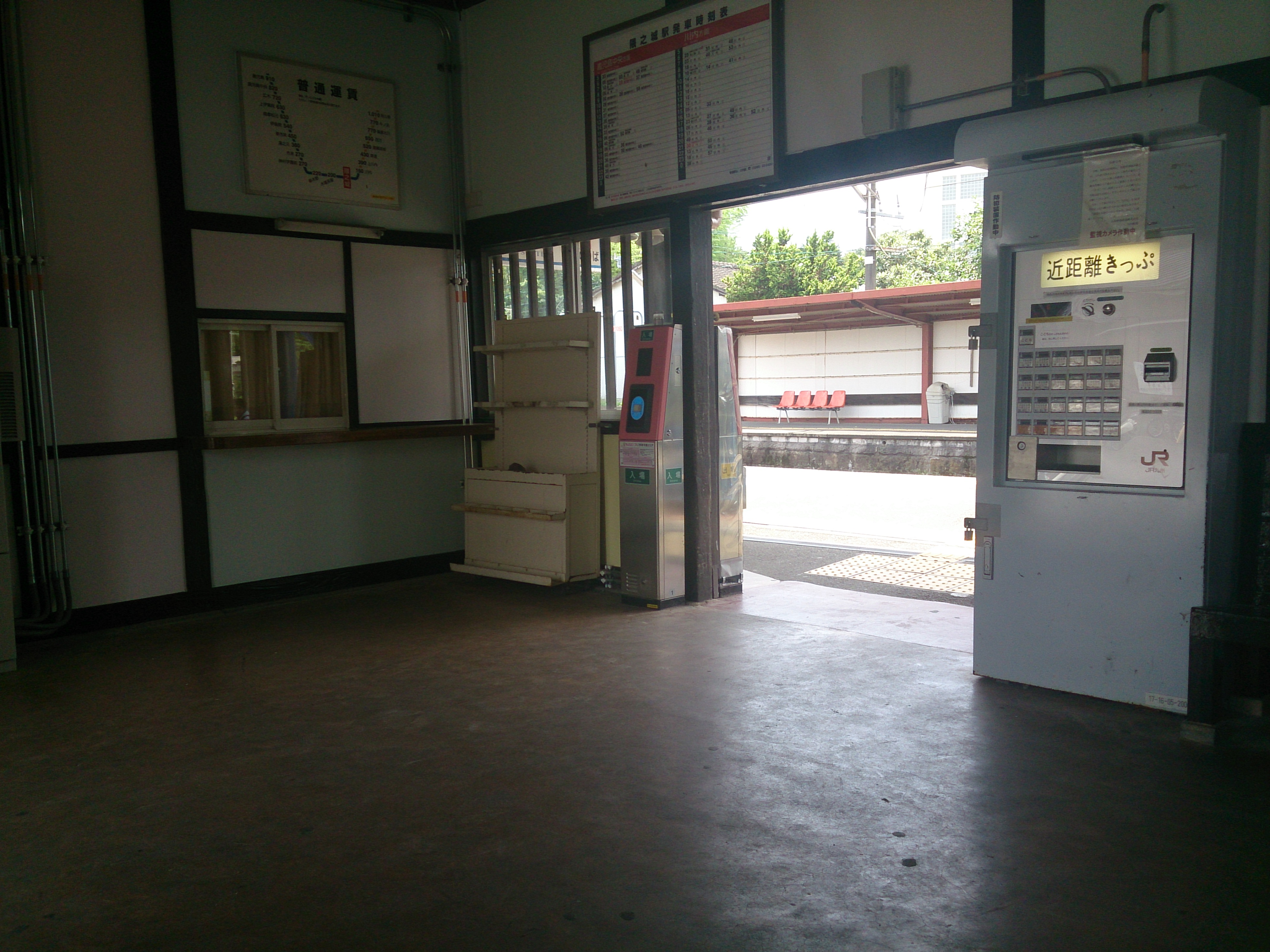 隈之城駅駅舎内